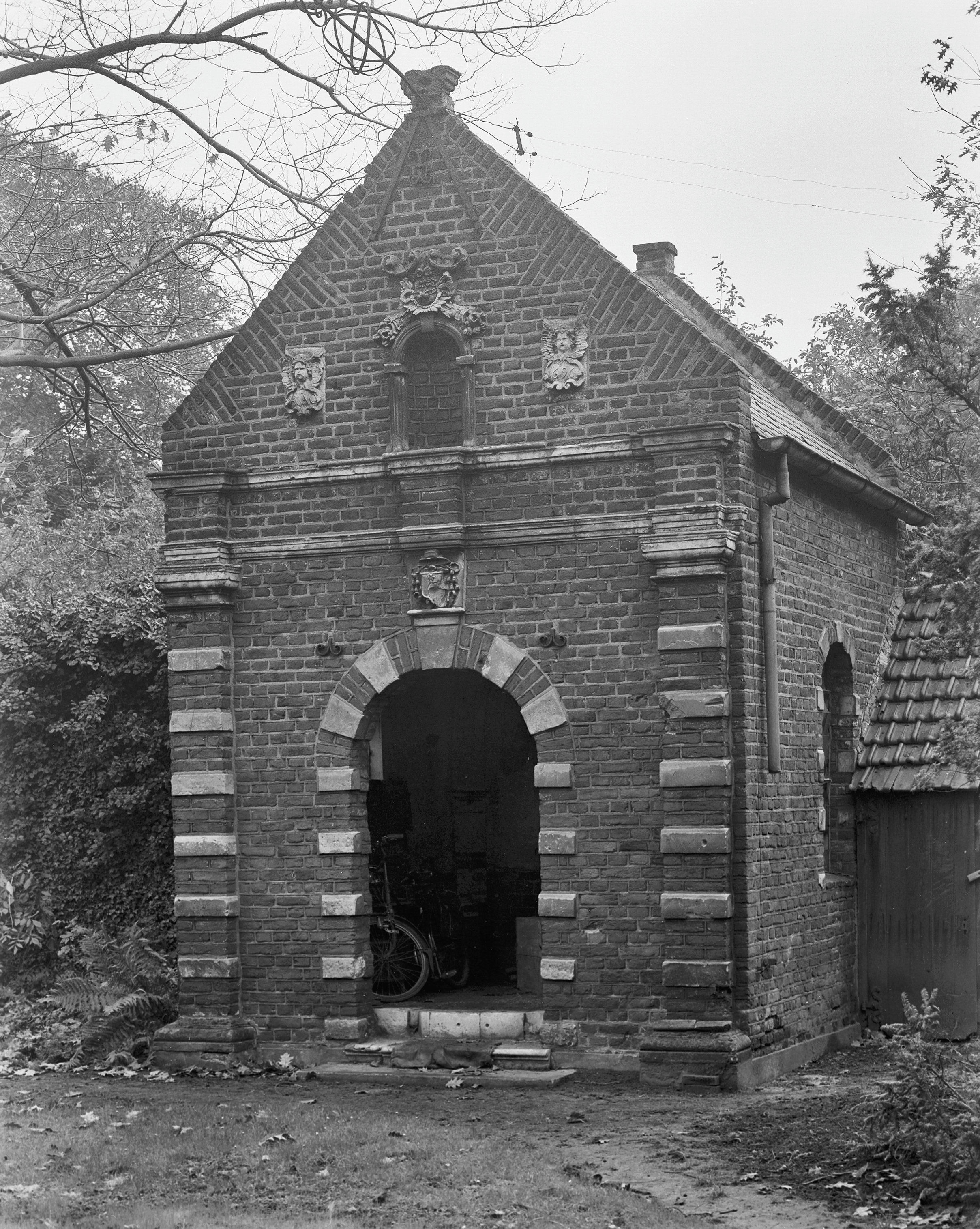 Landbouwhuis Ursalinenklooster: kapelletje in de achtertuin